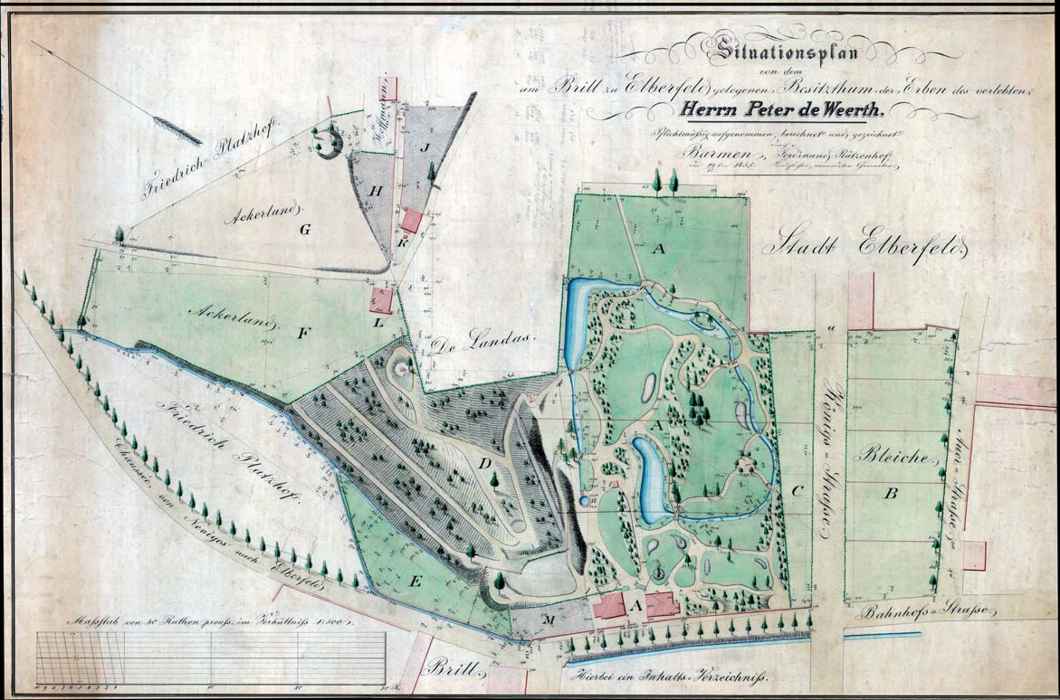 Situationsplan von dem am Brill zu Elberfeld gelegenen Besitzthum der Erben des Herrn Peter de Weerth, Geometer Ferdinand Rützenhof, 1855, Historisches Zentrum Wuppertal